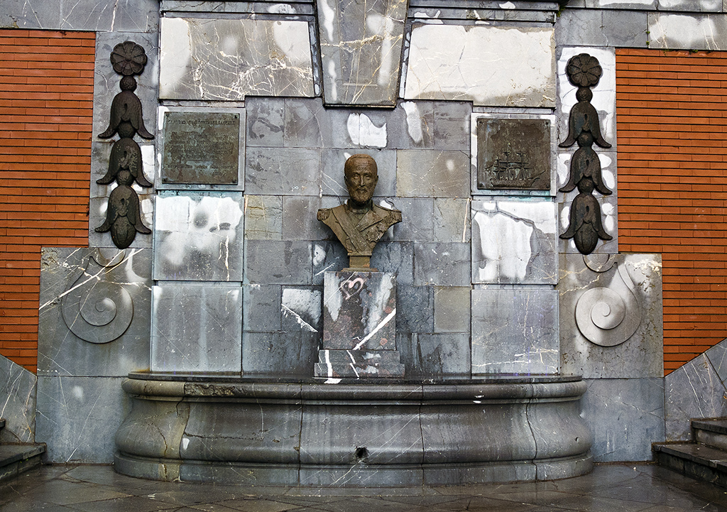 Escultura en Gijón, dedicada al marino Claudio Alvargonzález Sánchez (Gijón; 9 de agosto de 1816 - Ibídem; 21 de agosto de 1896).